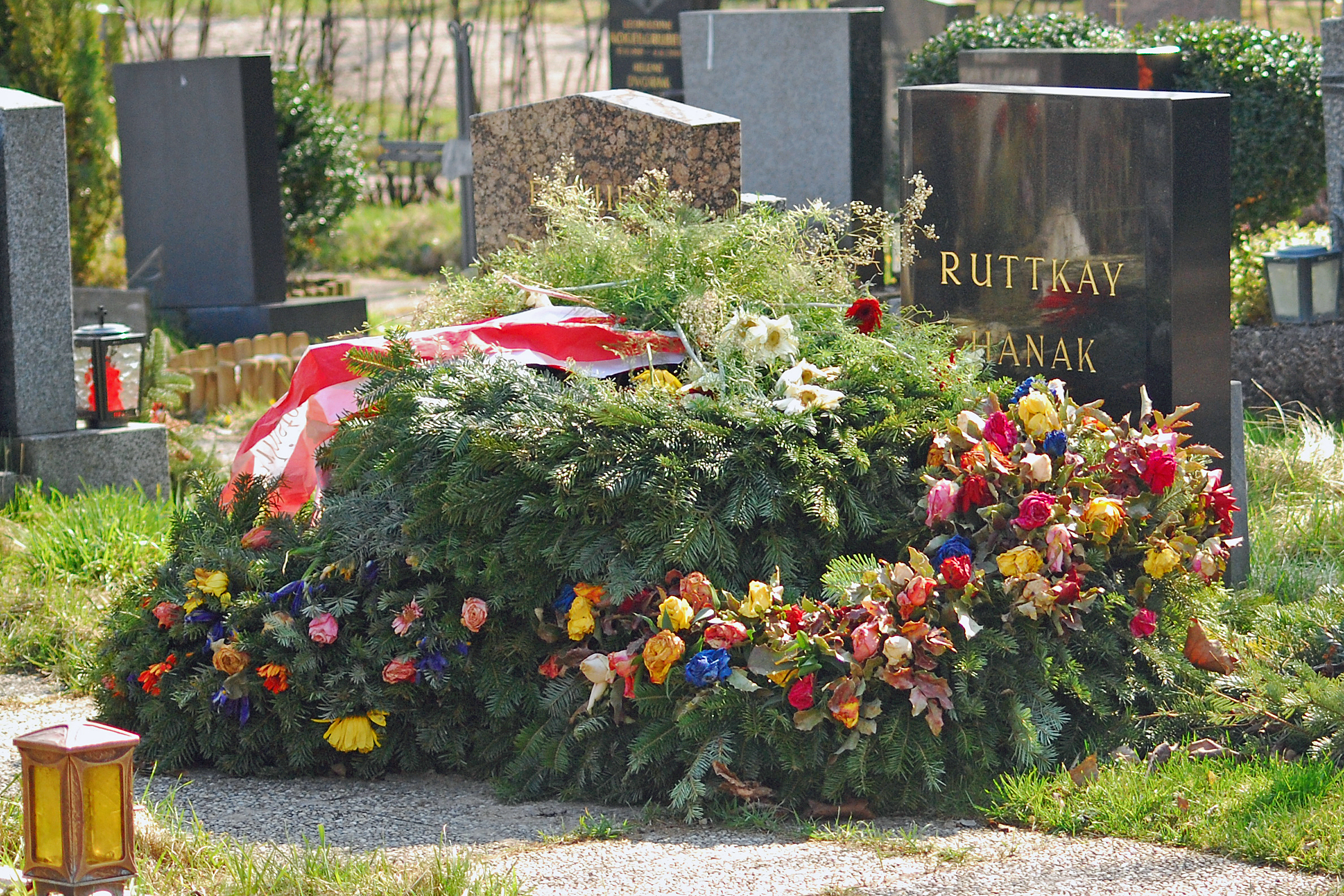 Grab Elisabeth Ruttkay, Urnenfriedhof Simmering, Wien